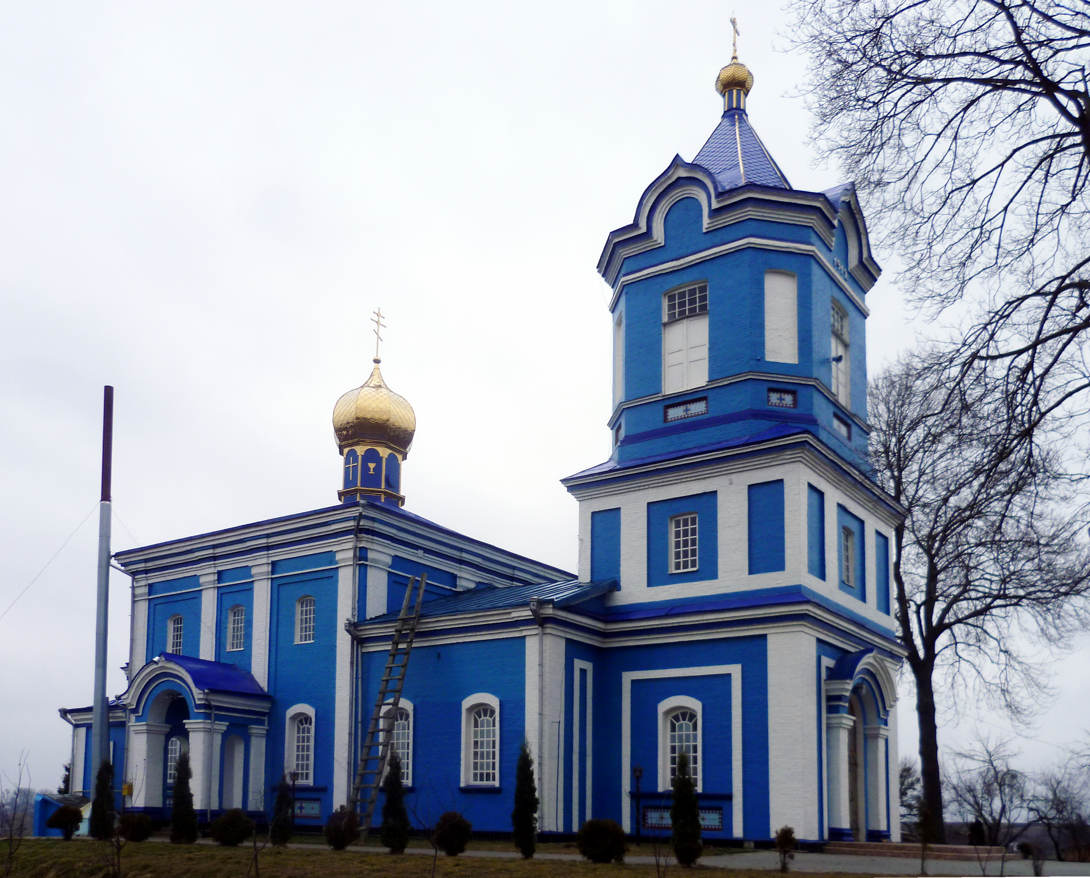 Соборобогородицька церква (мур.) (1920 рік) – вигляд з північного заходу – с.Забороль Луцький район Волинська область Україна